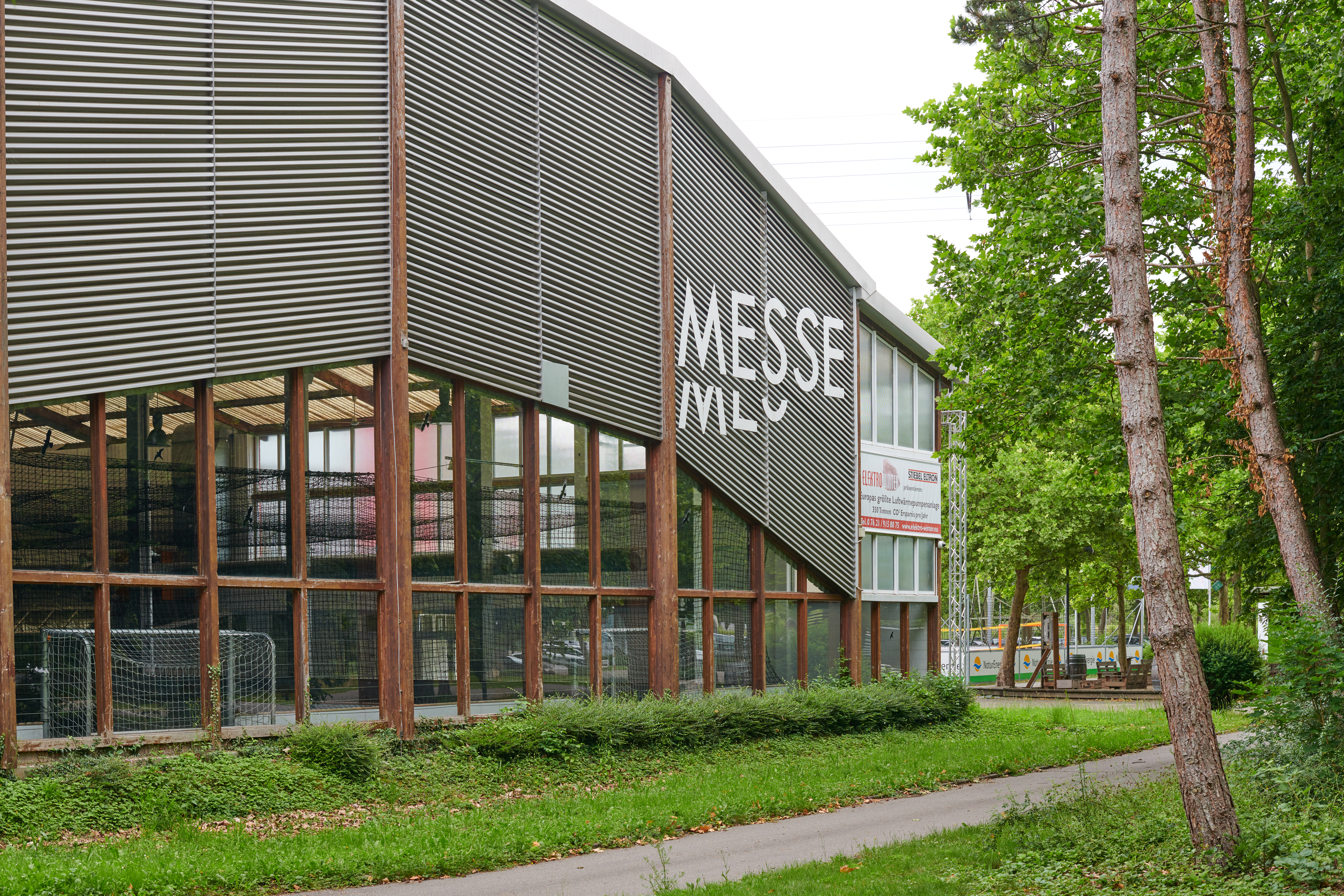 Landschaftspark Grütt Lörrach: Messehalle